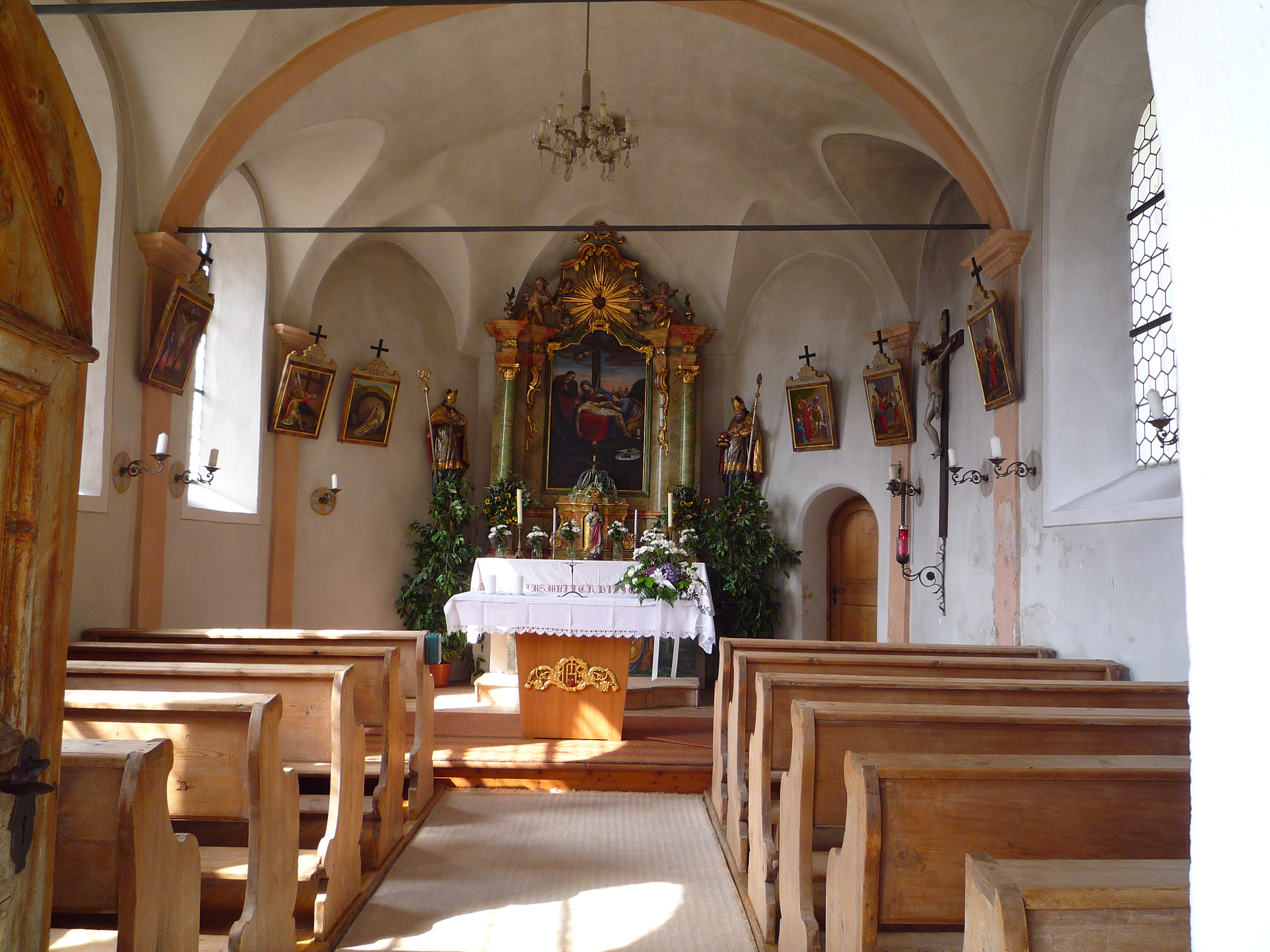 Schmerzhaften Mutter Gottes Kirche à Köfels (Tyrol, Autriche)